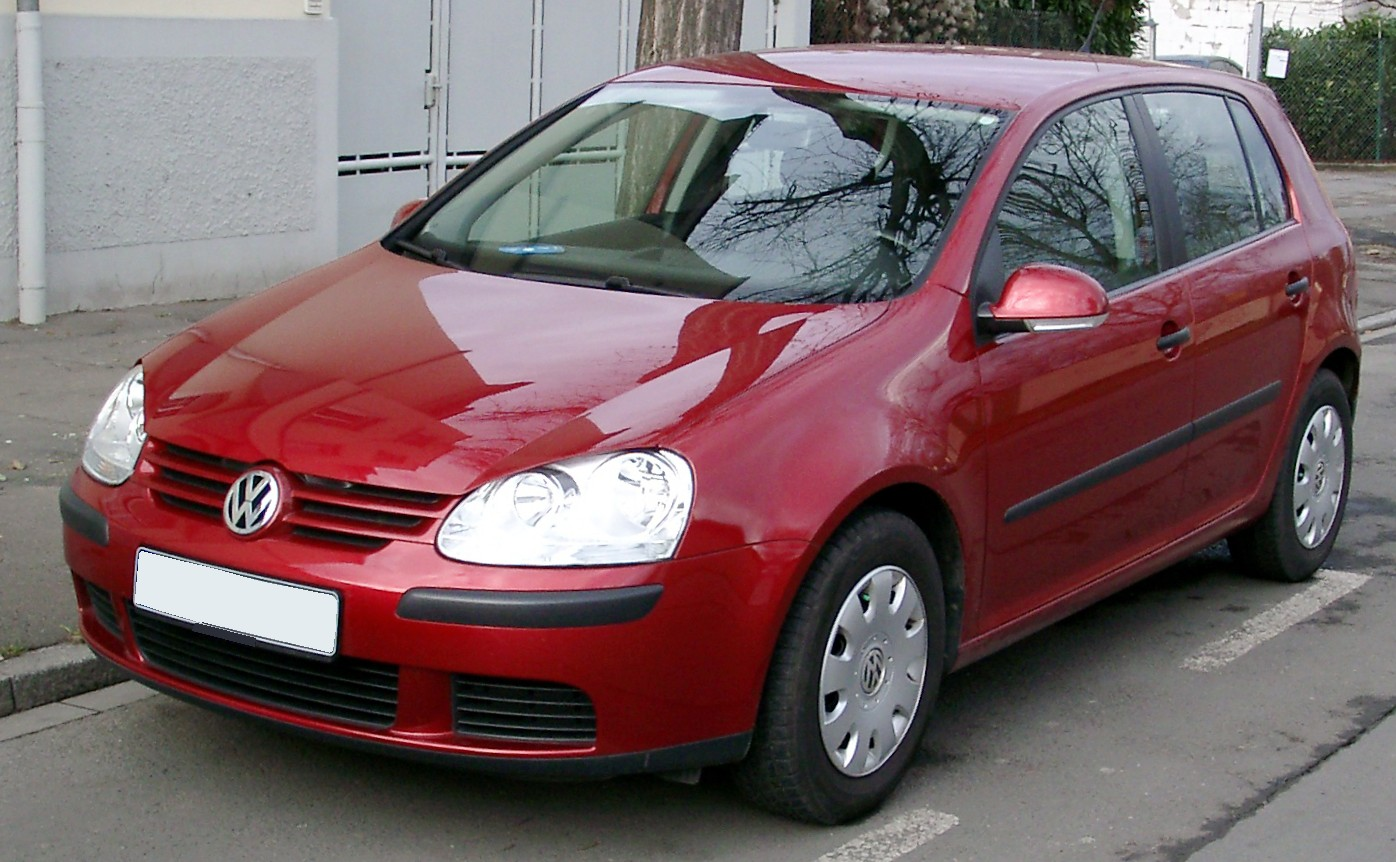 VW Golf V